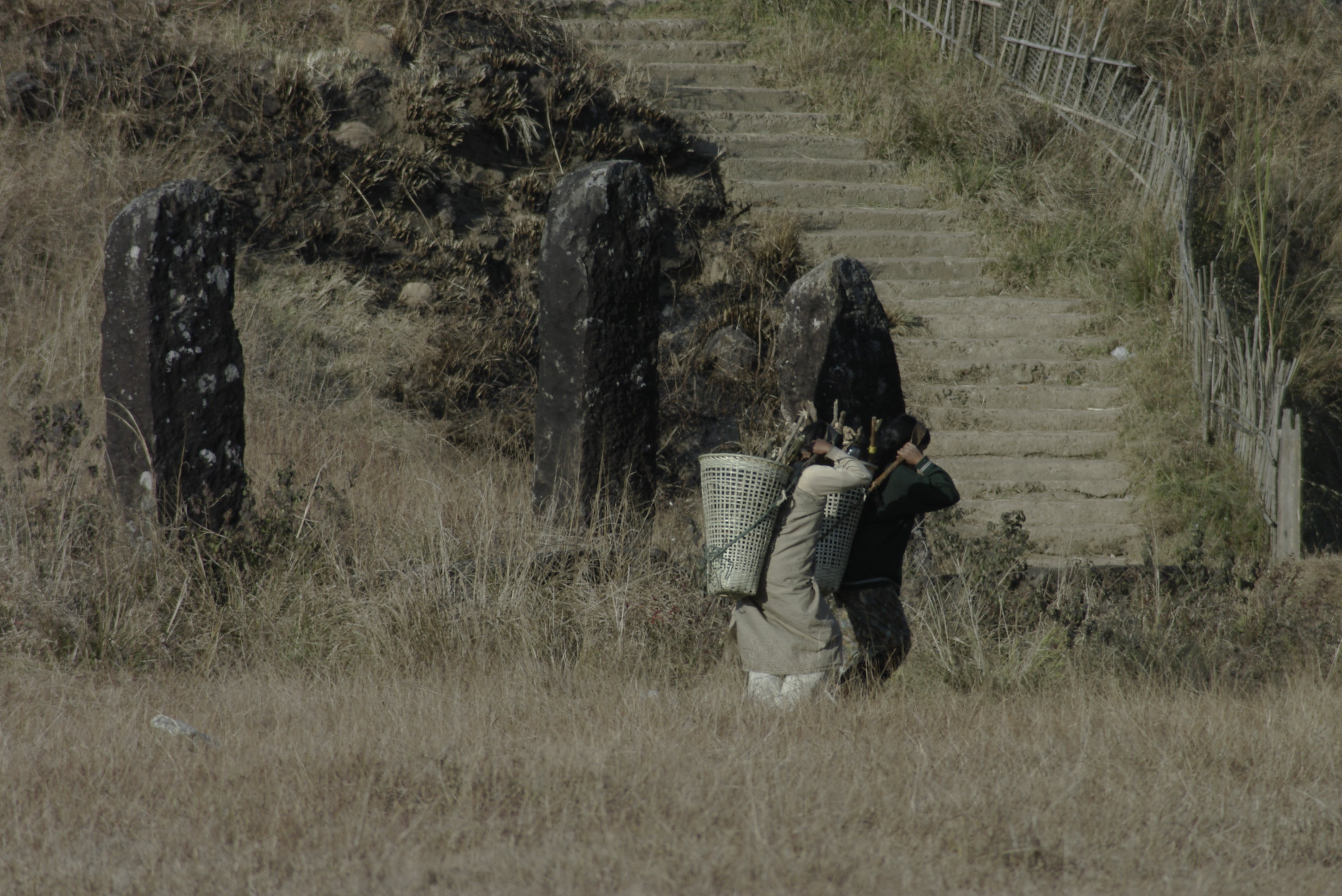 Monoliths, below Cherrapunji Meghalaya India